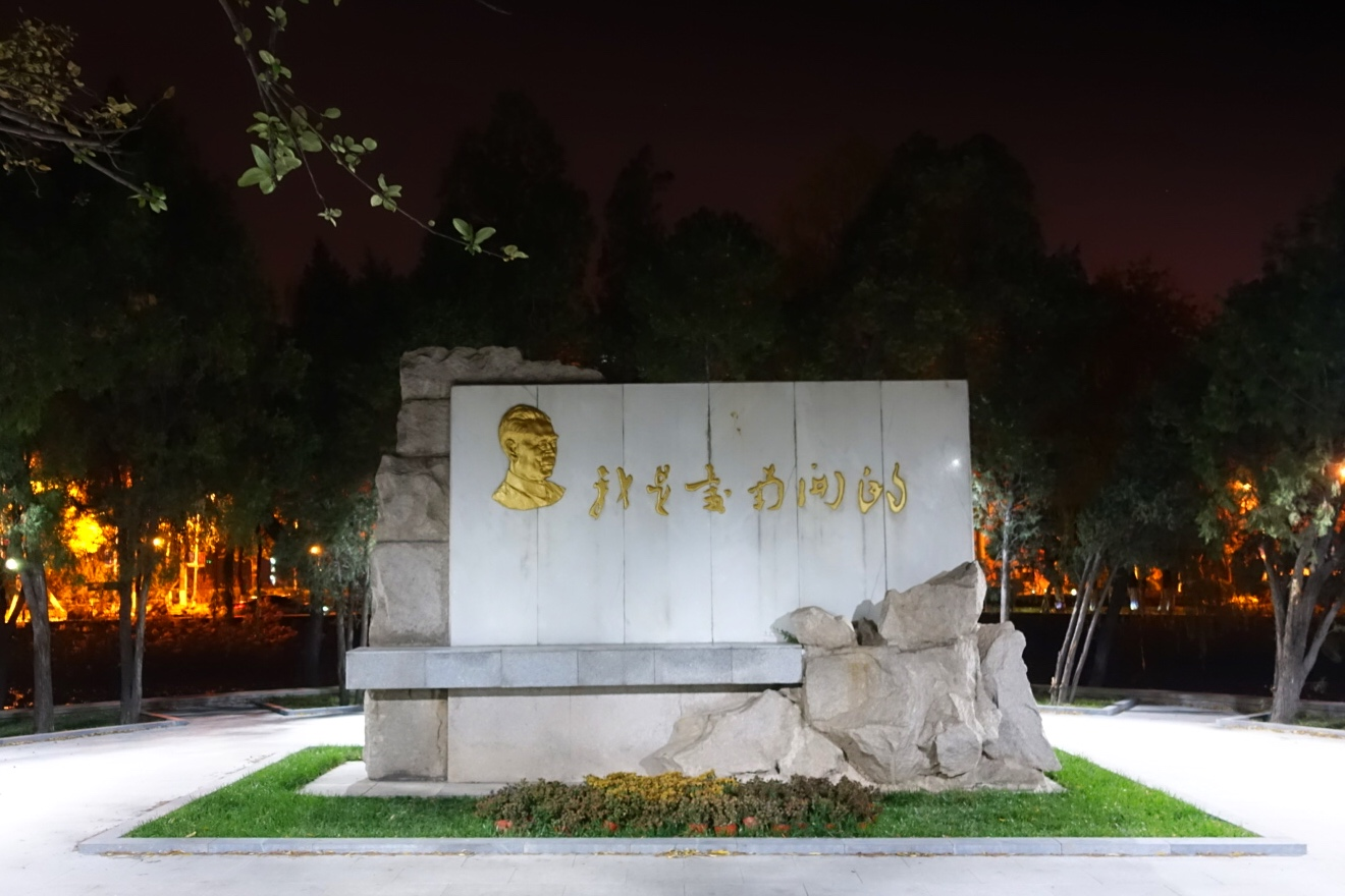 中文（中国大陆）: 南开大学马蹄湖湖心岛周恩来同志纪念碑